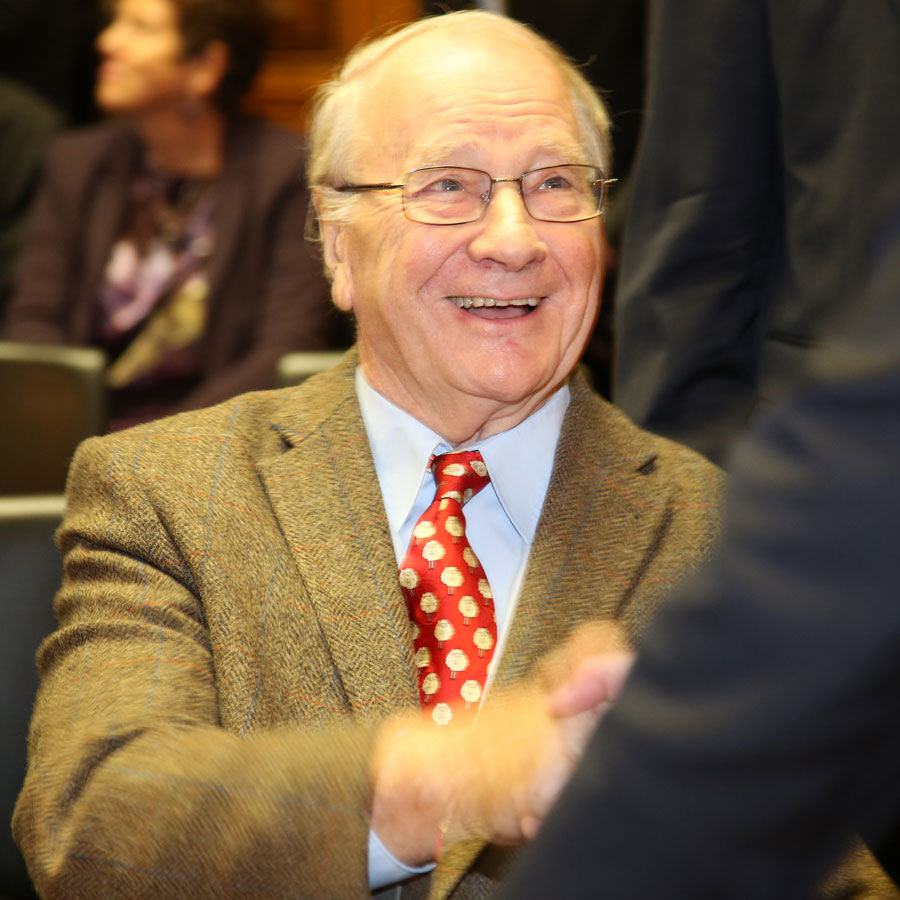 BM Dr. Harald Ofner-9062